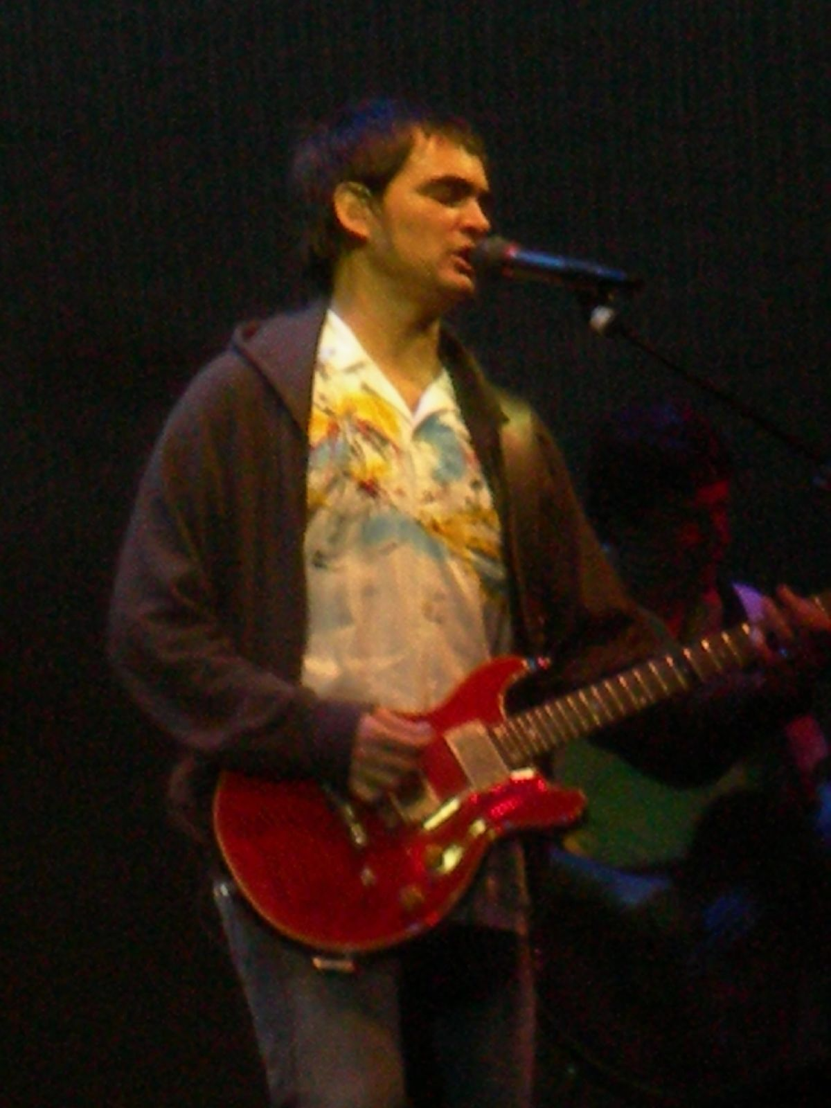 Samuel Rosa, from Skank